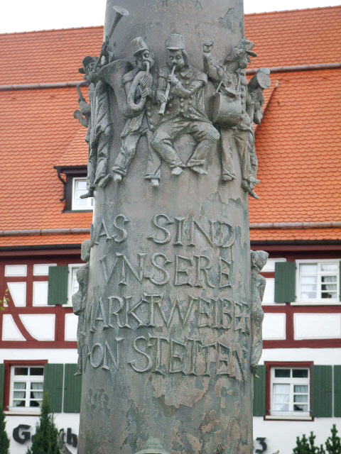 Stetten am kalten Markt